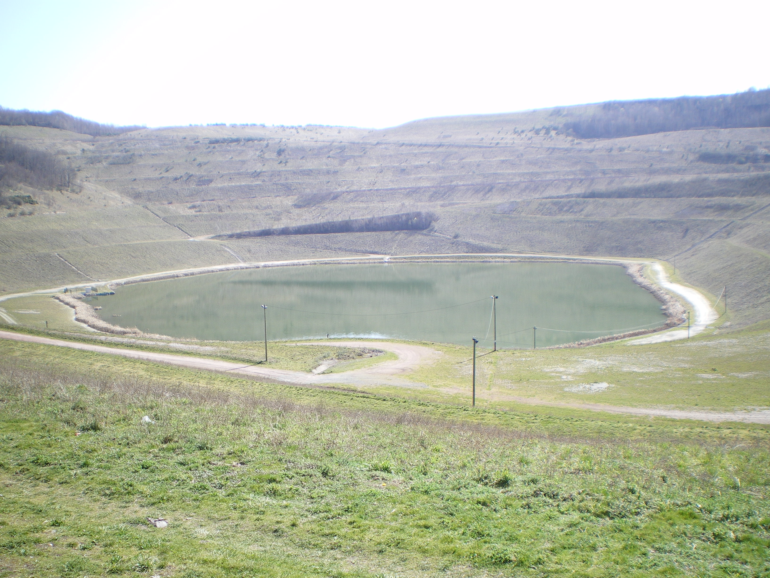 La Découverte, Decazeville, Aveyron, France